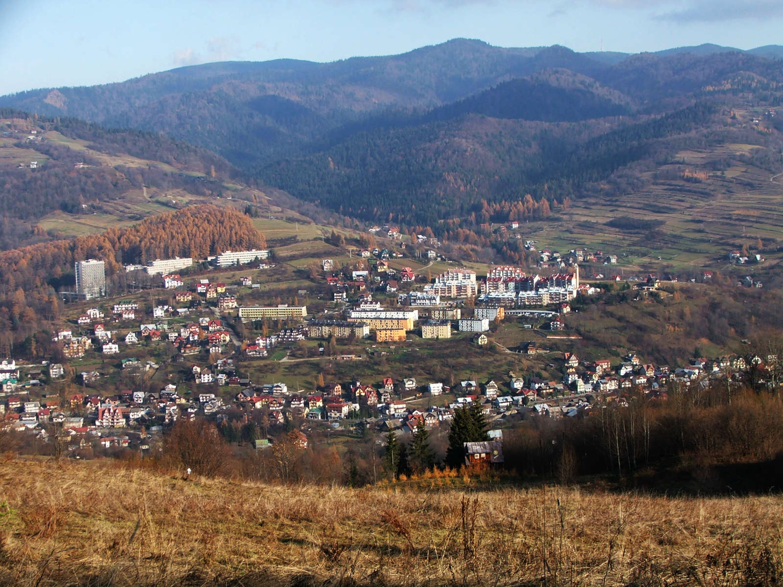 Szczawnica - widok z Danielki